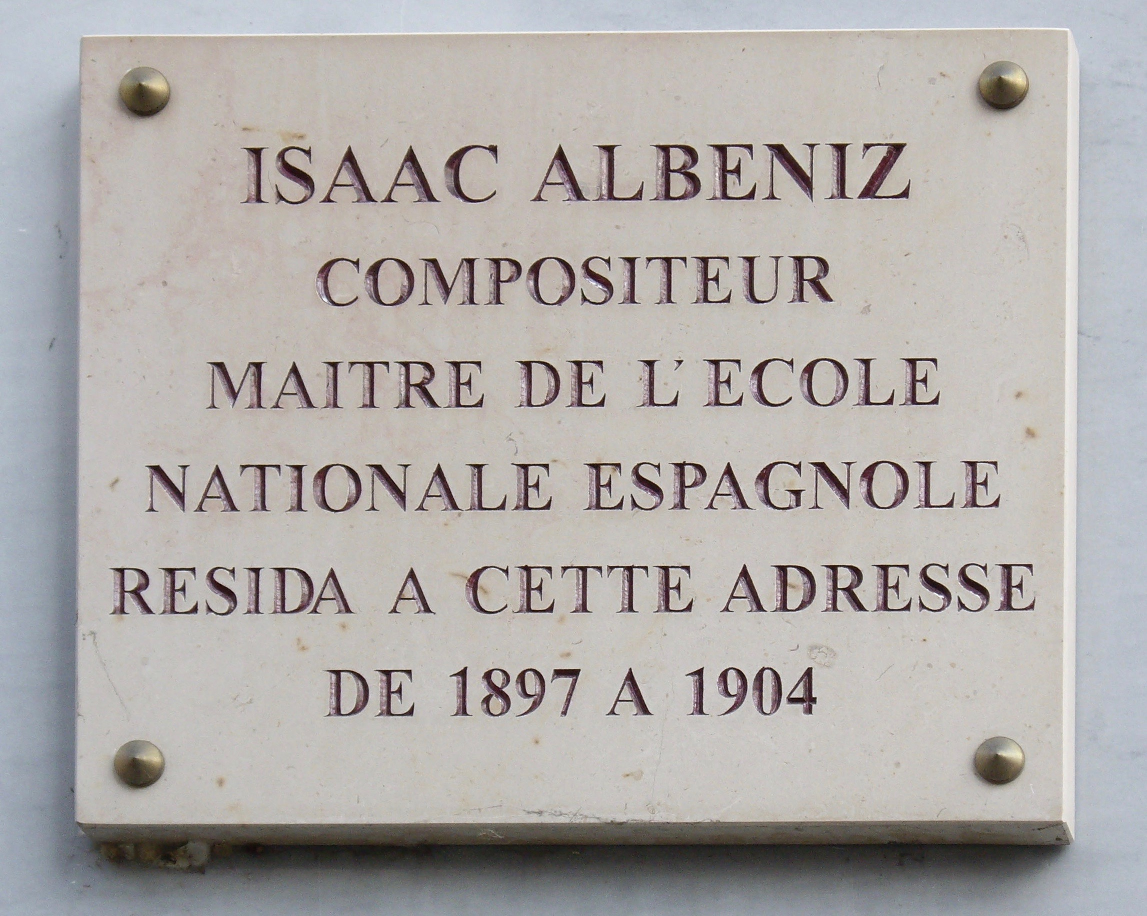 Plaque commémorative, 49 rue Erlanger, Paris 16e. « Isaac Albéniz, compositeur, maître de l'école nationale espagnole, résida à cette adresse de 1897 à 1904. »